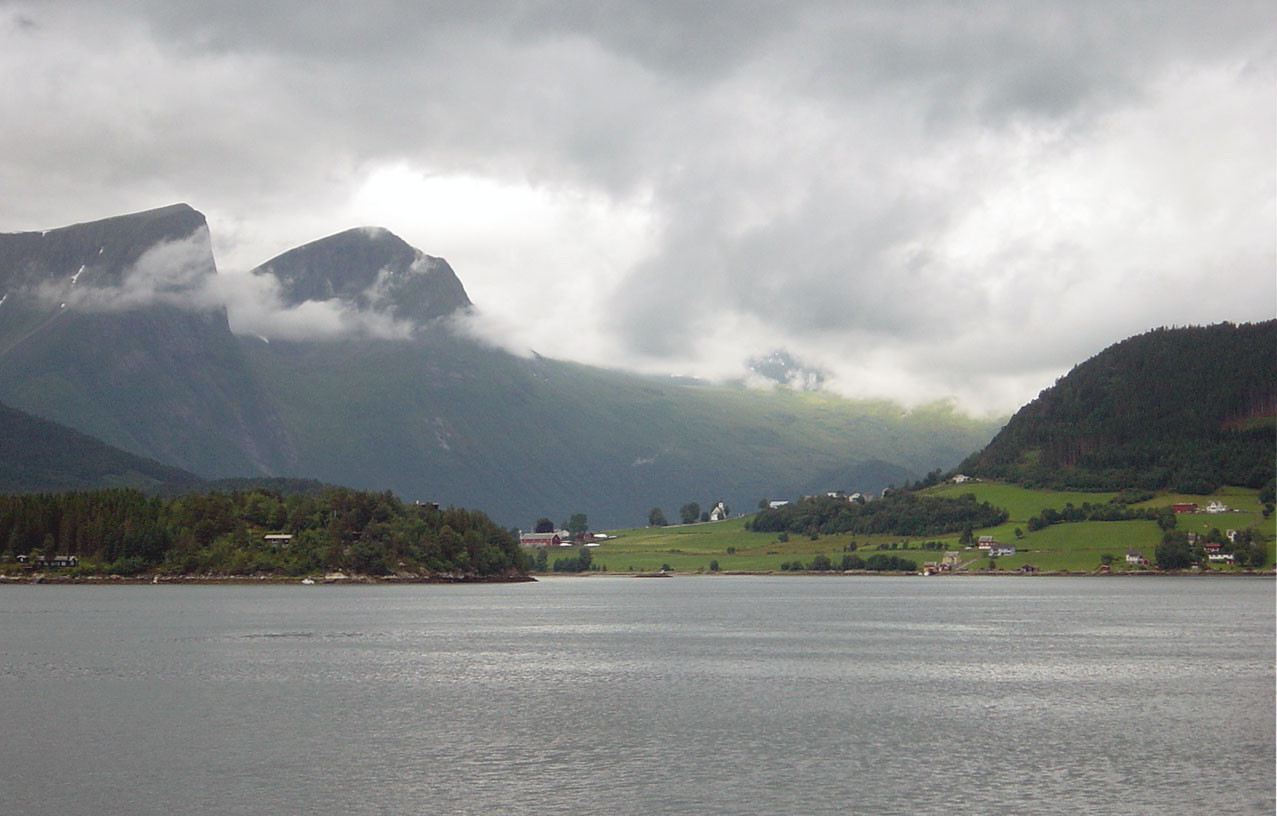 Eidsbygda, Rauma, in Norway